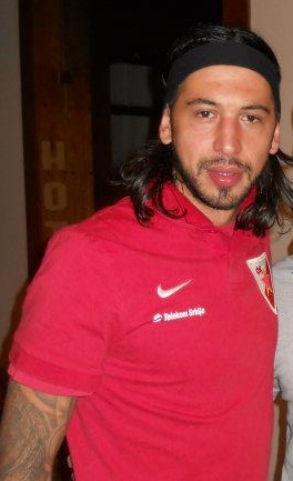 Бобан Бајковић